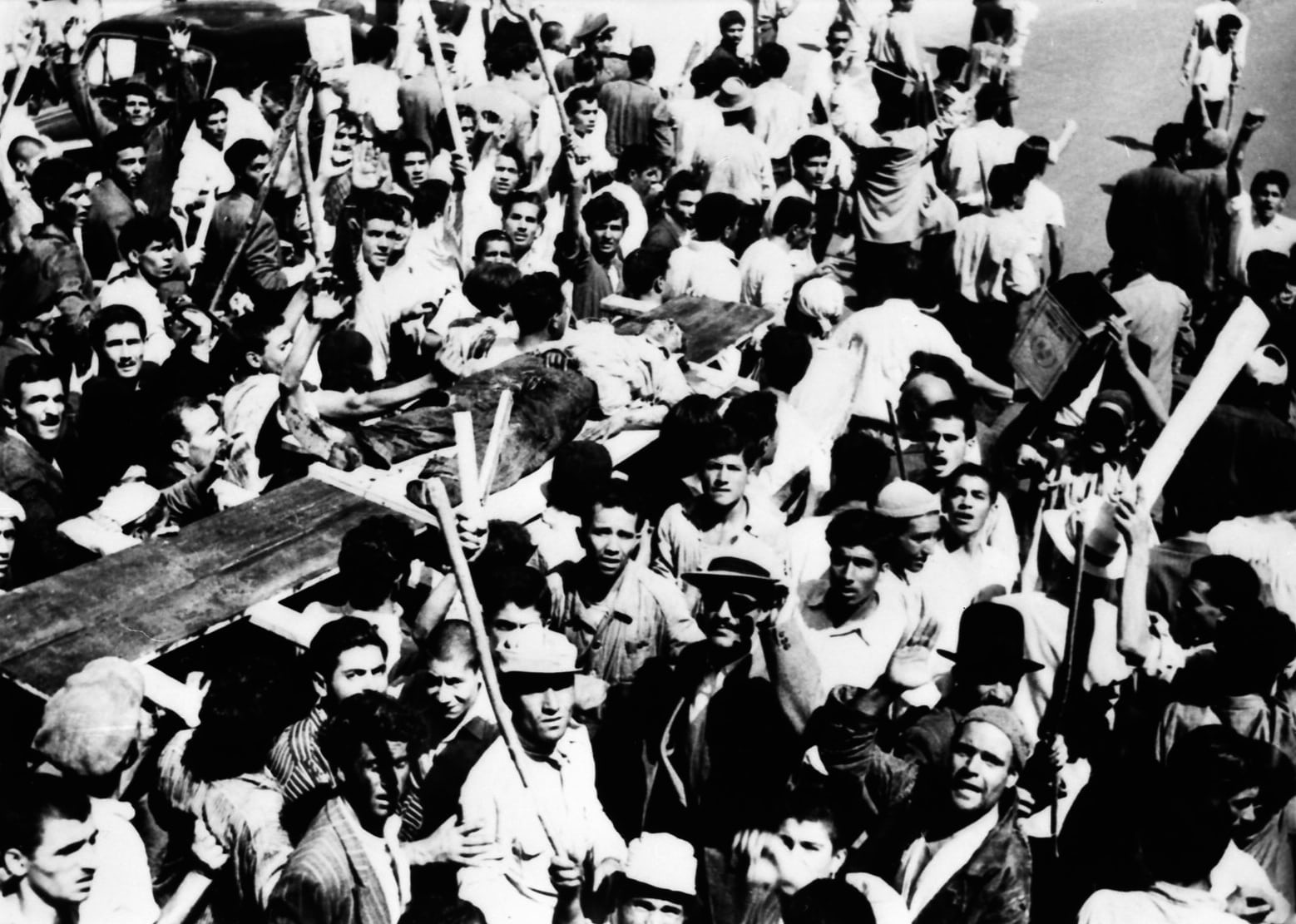 28 مرداد 1332، 2:30 بعد از ظهر: خونبارترین نقطه شهر در جلوی خانه مصدق بود. مردم، اجساد مردگان را دوره می کردند تا دیگران را به هیجان آورند.